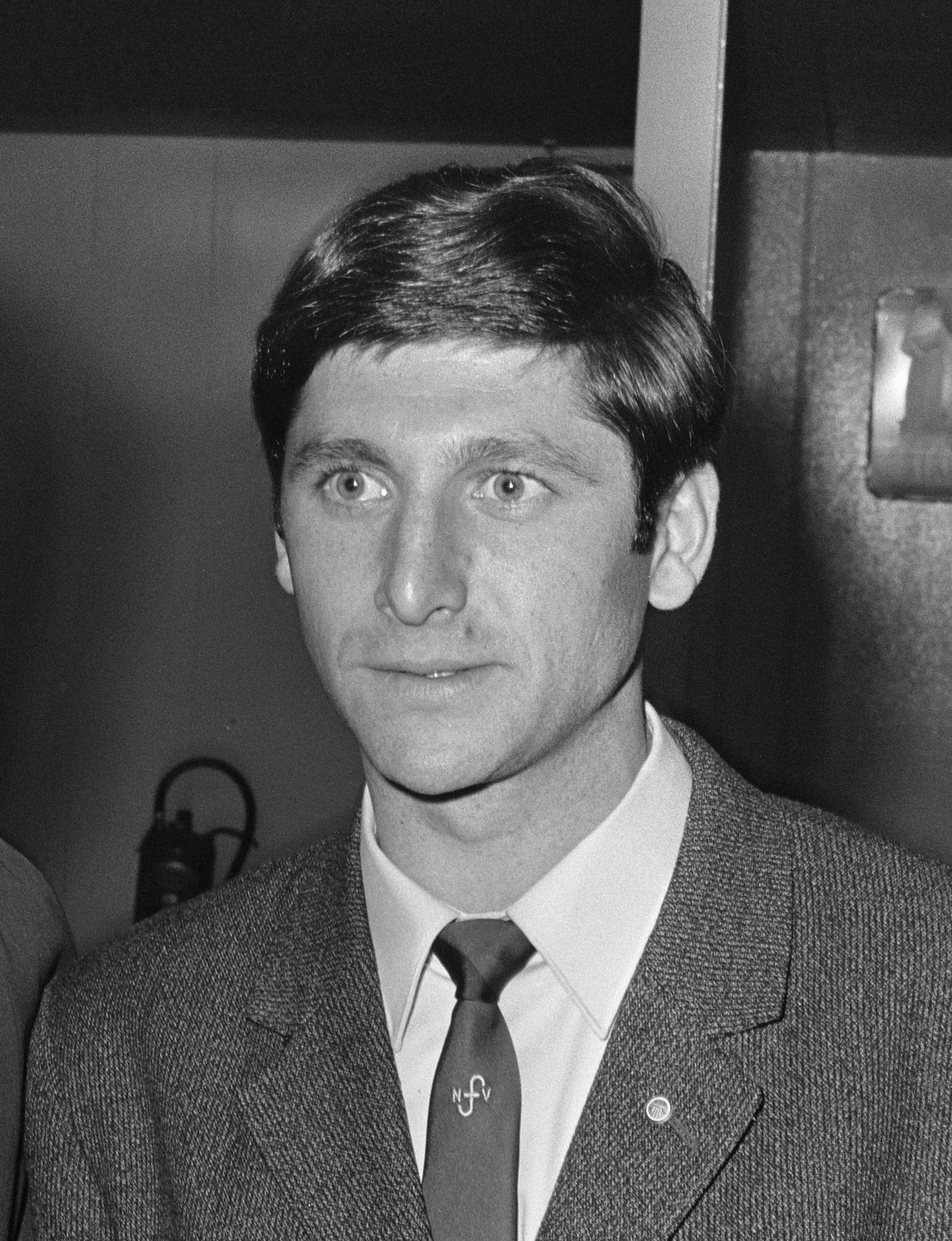 Bulgaars voetbalelftal arriveert op Zestienhoven. Simeon Simeonov